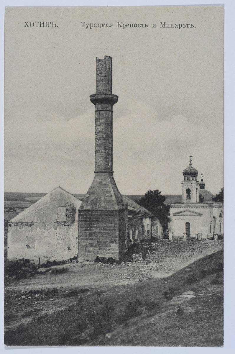 Турецький мінарет, що залишився від мечеті.